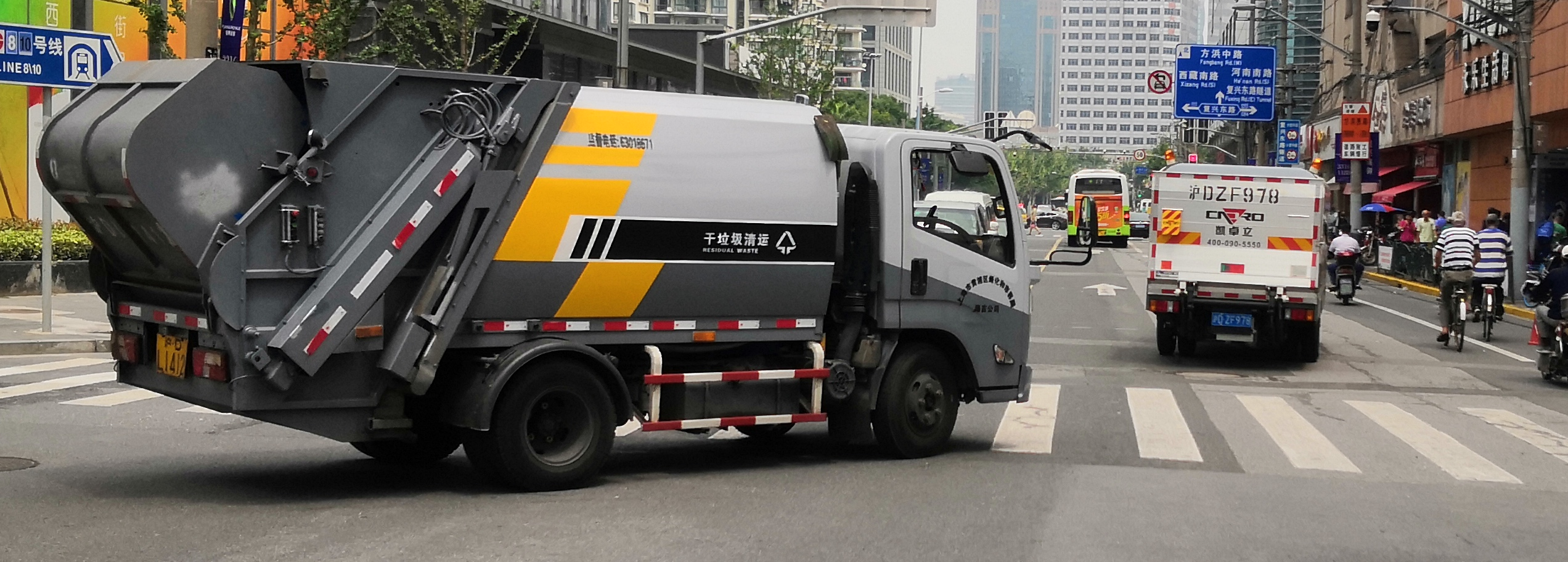 上海的垃圾处理